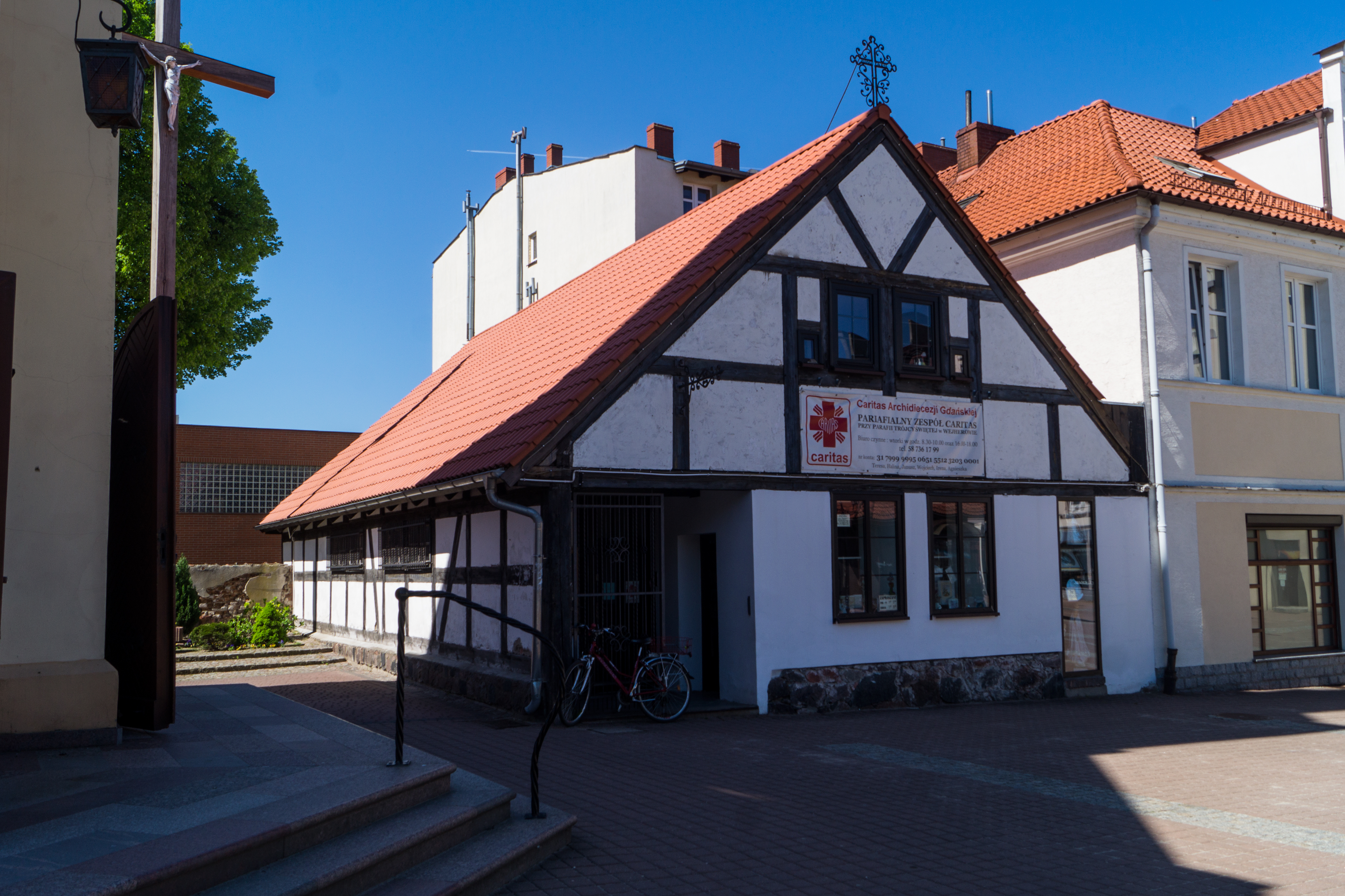 Budynek dawnego szpitalika w Wejherowie na placu Jakuba Wejhera przy parafii pw. Trójcy Świętej.